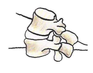 Yoga anatomie